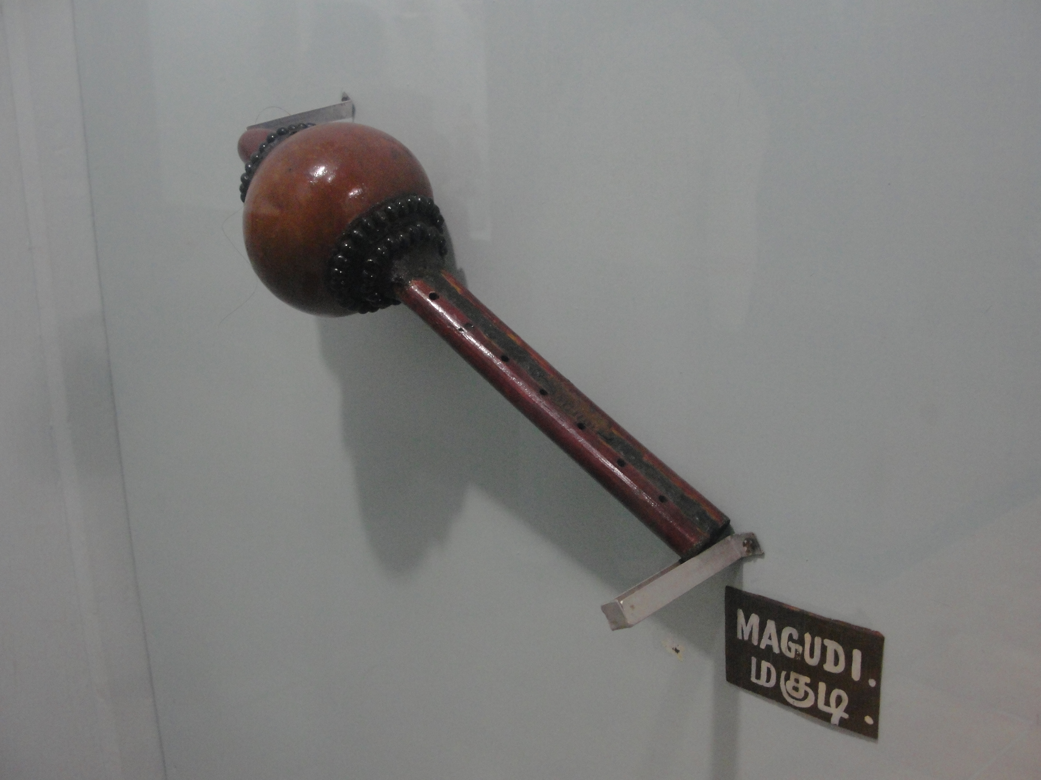 மகுடி